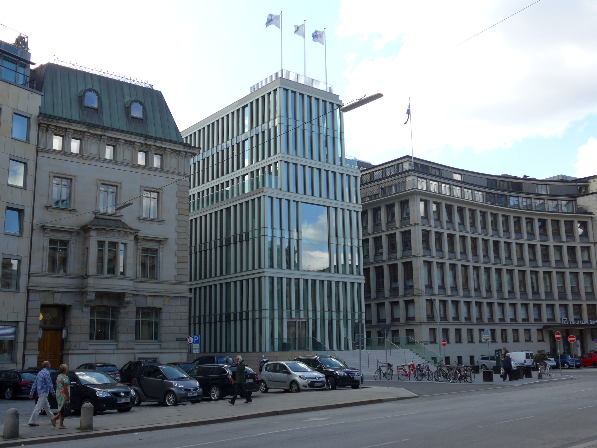 Adolphsplatz1. Gebäude von links: This is a photograph of an architectural monument. Hamburg, Zentrale der HASPA am Adolphsplatz 1906/7. Mittig der Altbau Adolphsplatz 5/Ecke Mönkedamm erbaut 1907 als Bankhaus für Berenberg-Gossler von Martin Haller und Hermann Geißler (Umbau 1977/78), heute Teil der Haspa-Zentrale. HSBA Hamburg School of Business Administration